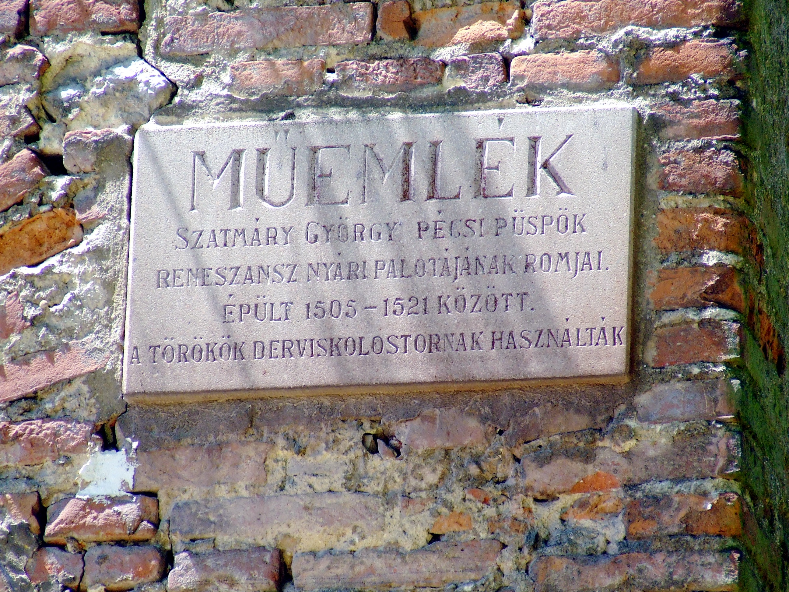 Emléktábla a tettei Szathmáry-villa romjain